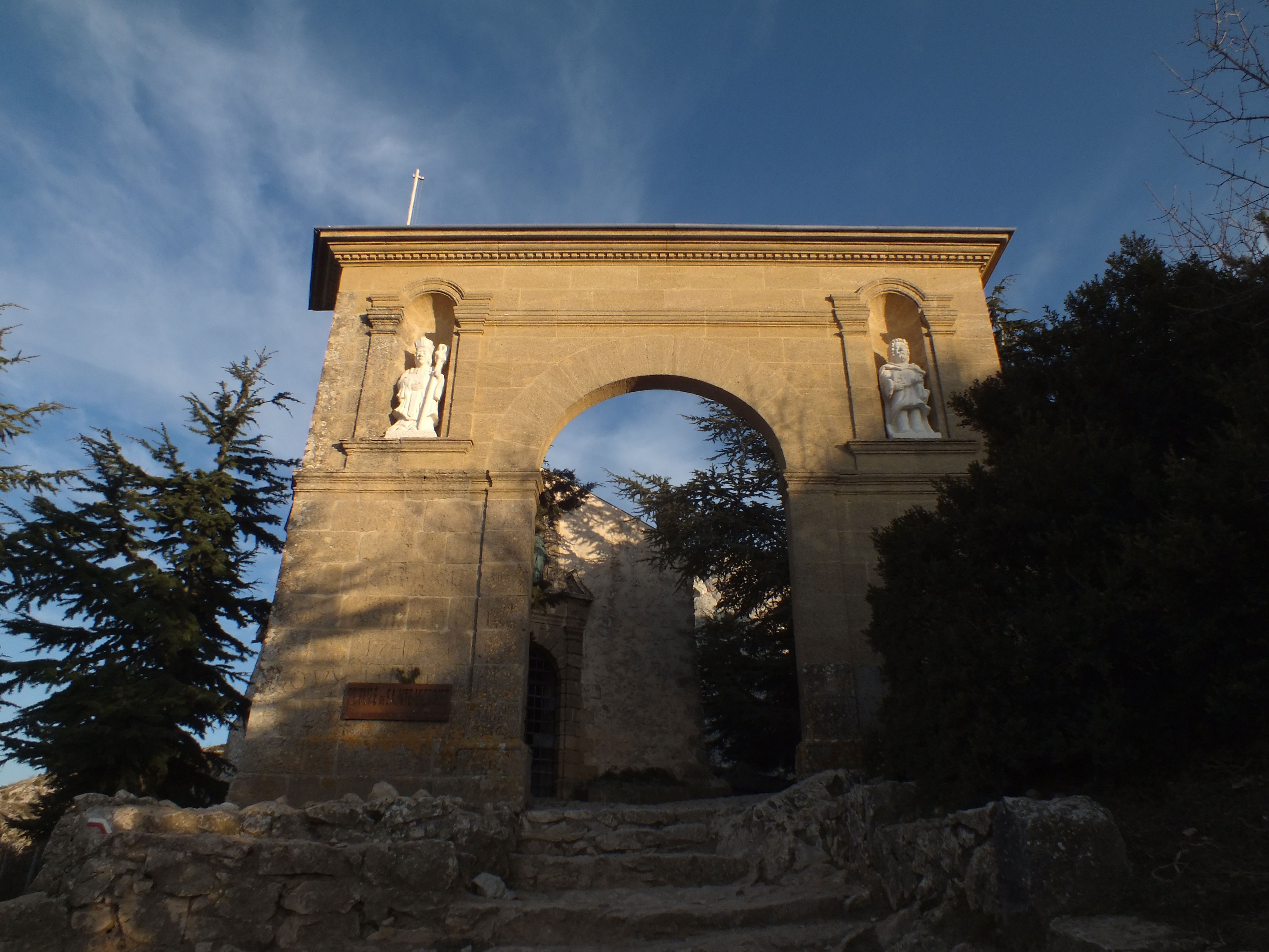 Prieuré de Sainte-Victoire .